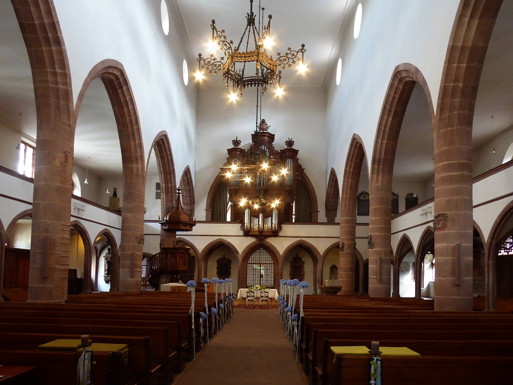 Innenraum in der Peterskirche. Die Kirche ist ein Sakralbau in der Schweizer Stadt Basel. Sie ist dem heiligen Petrus geweiht und dient nach Umnutzungen und Erneuerungen seit 1529 als evangelisch-reformierte Kirche.